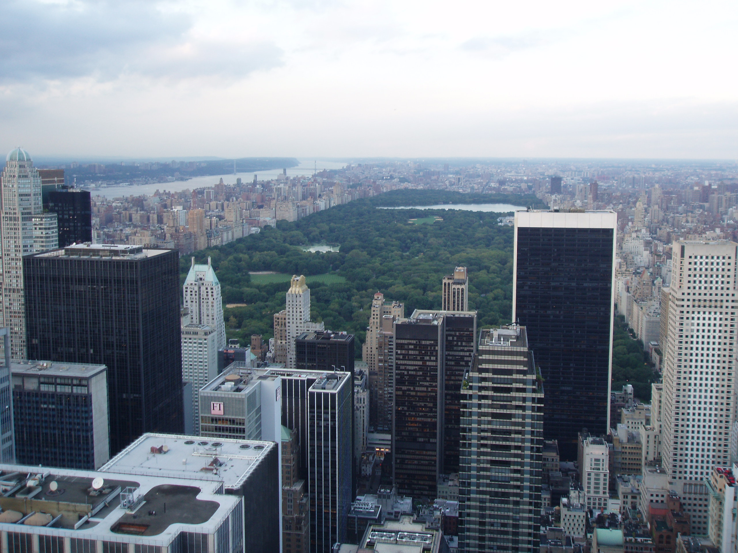 Widok na Central Park z Top of the Rock